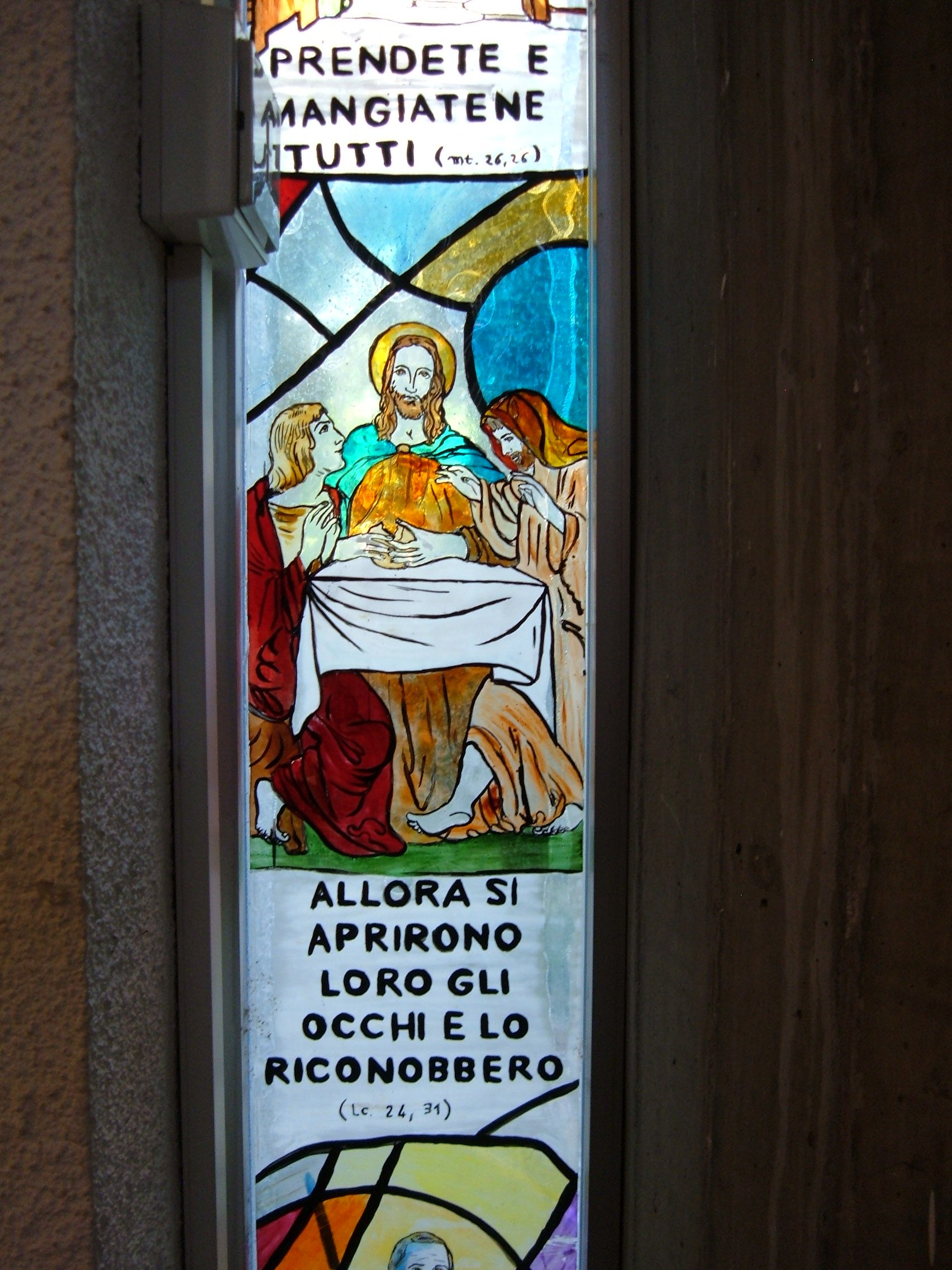 Chiesa della Santissima Trinità, a Roma, nel quartiere Trieste.